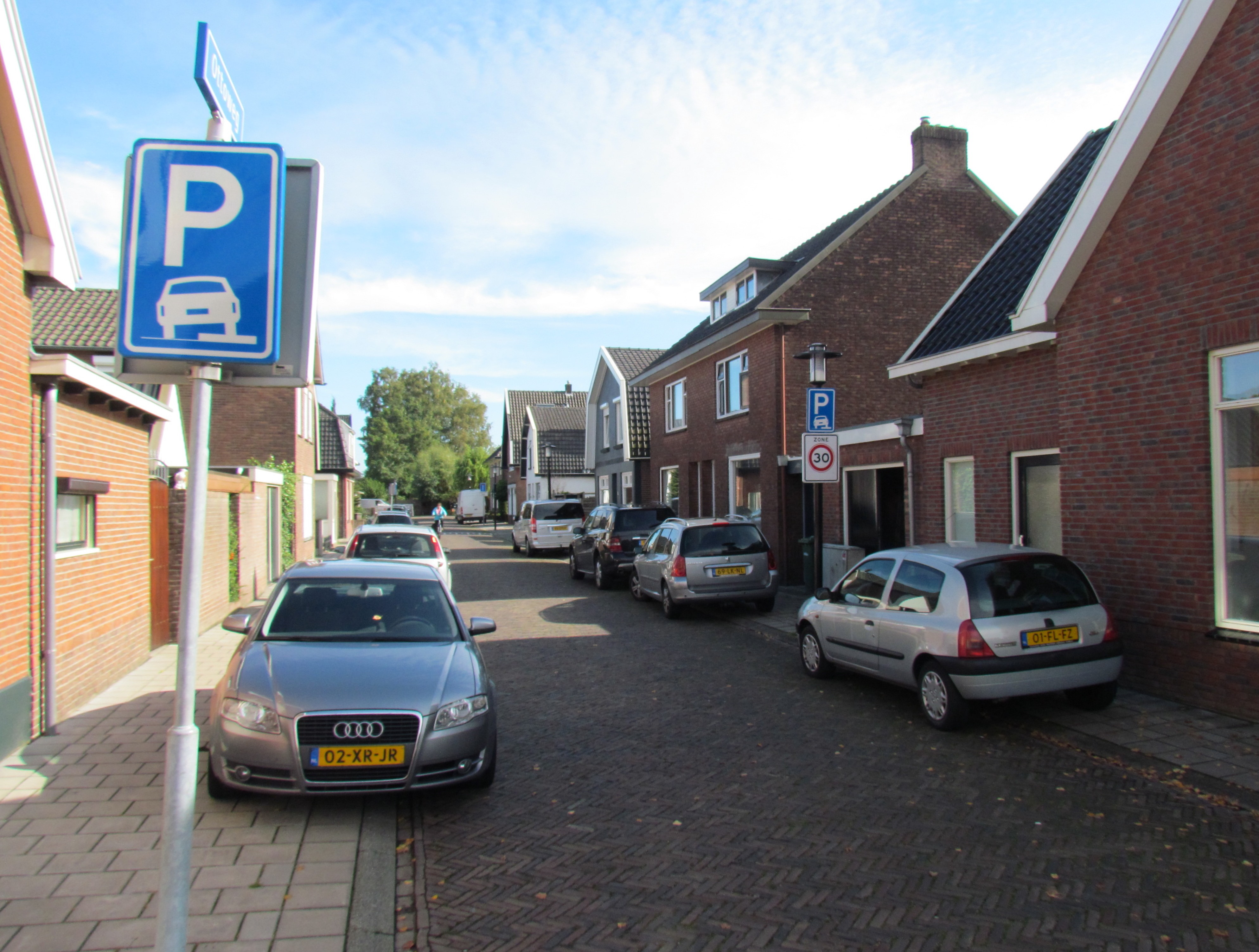 De Ottoweg in Hengelo (Overijssel, Nederland)